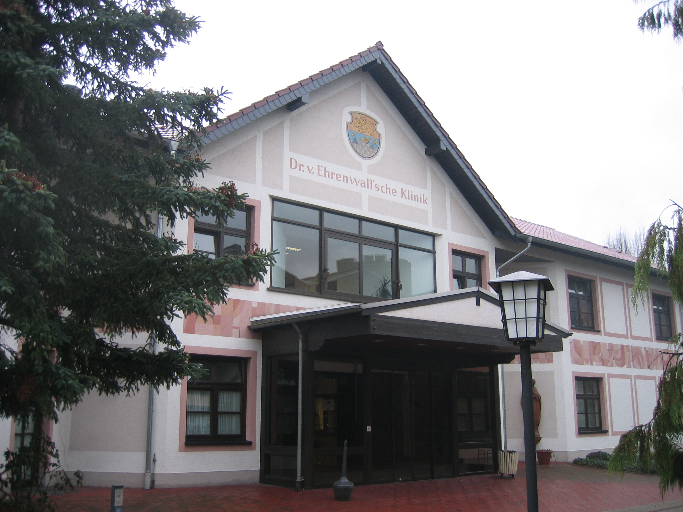 Villa Griesinger, eines der Gebäude der Dr. von Ehrenwall'schen Klinik (Ahrweiler)